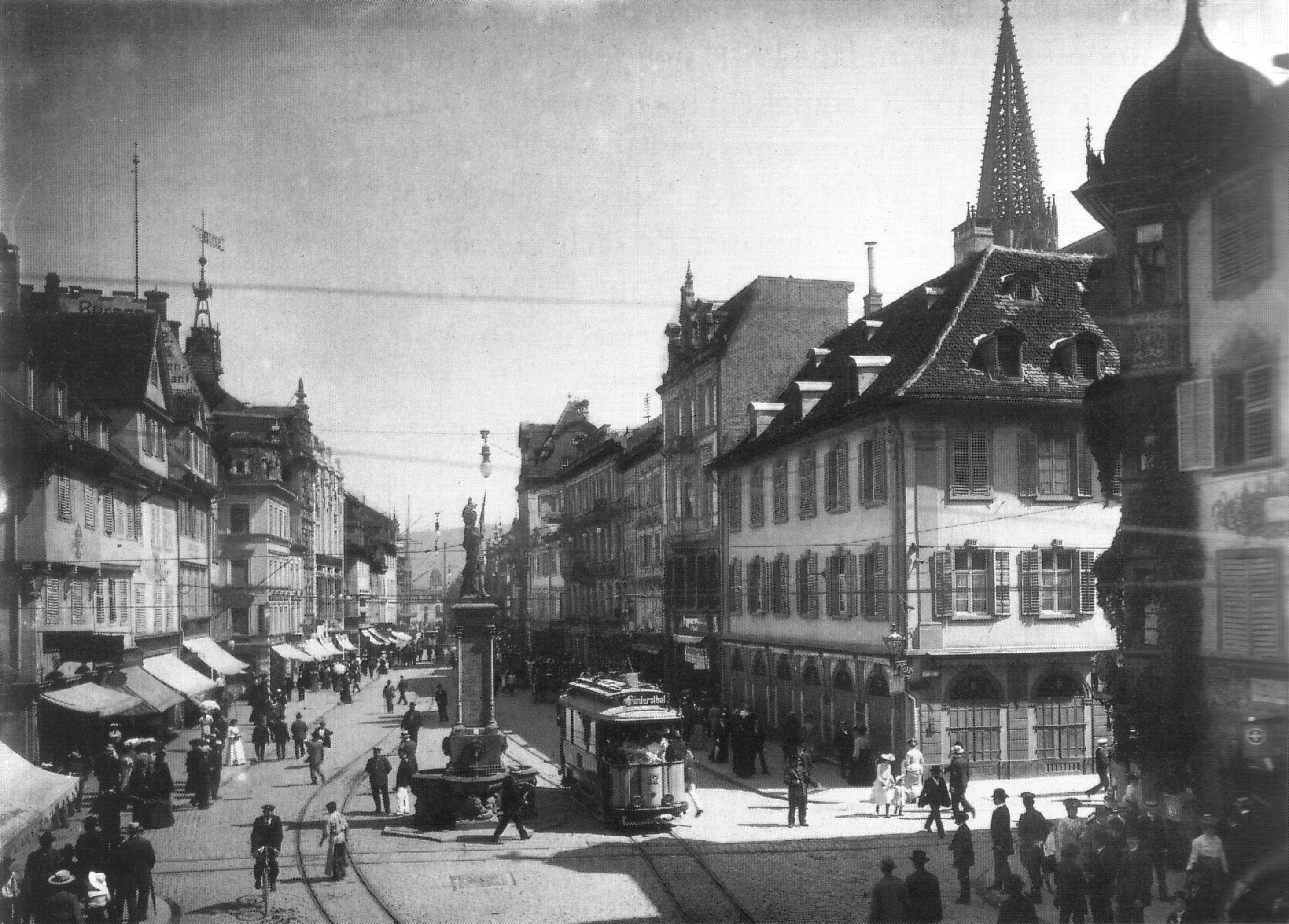 Die Kaiserstraße im Jahr 1904